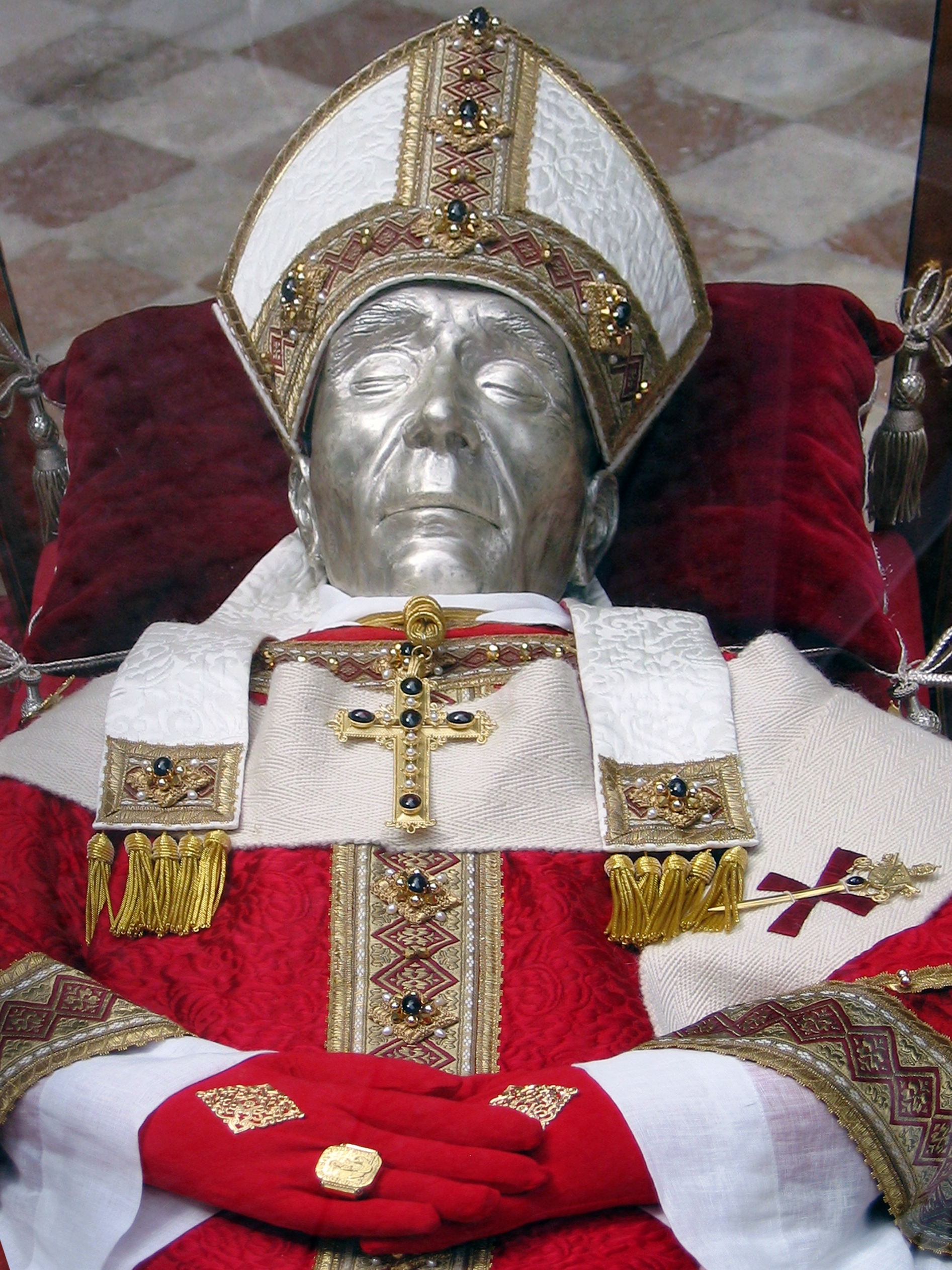 Il corpo di papa Celestino V con i paramenti rinnovati dopo la ricognizione canonica nel VII Centenario della sua canonizzazione (1313-1313). Basilica di S.M. di Collemaggio, L'Aquila.